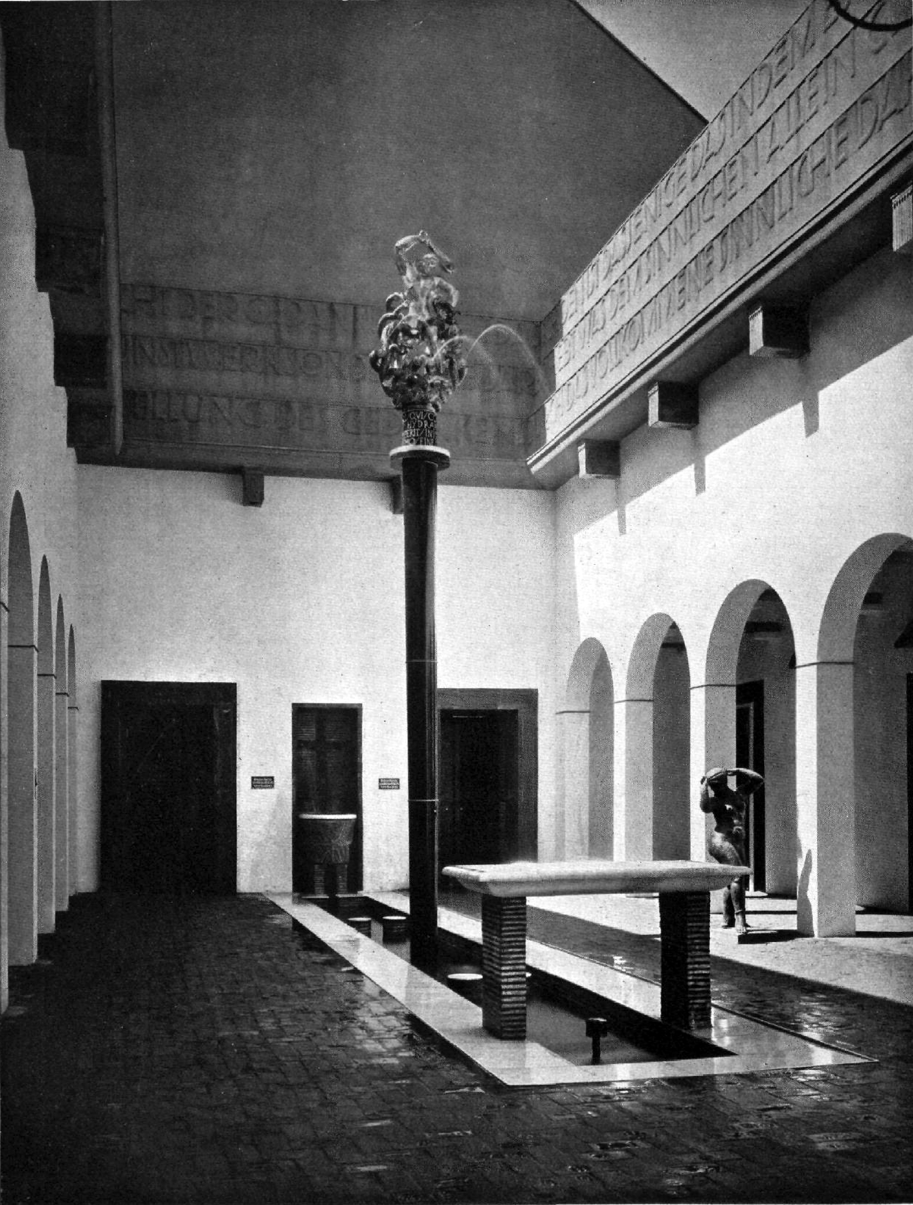 Der von Oskar-Strnad gestaltete Hof des österreichischen-Hauses auf der Werkbund-Ausstellung Köln, 1914